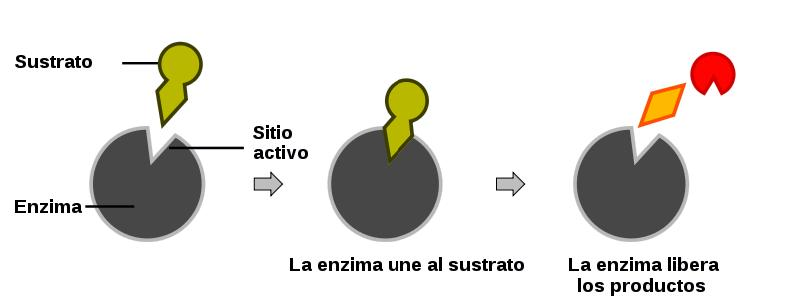 Diagrama esquemático de una unión llave-cerradura de un complejo enzima-sustrato.